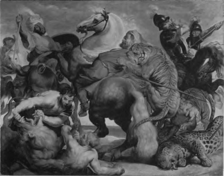 Rubens. Tiger. Lion and Leopard Hunt, modello (N:o.7a). Hartford, Conn., Wadsworth Atheneum, Sumner Collection